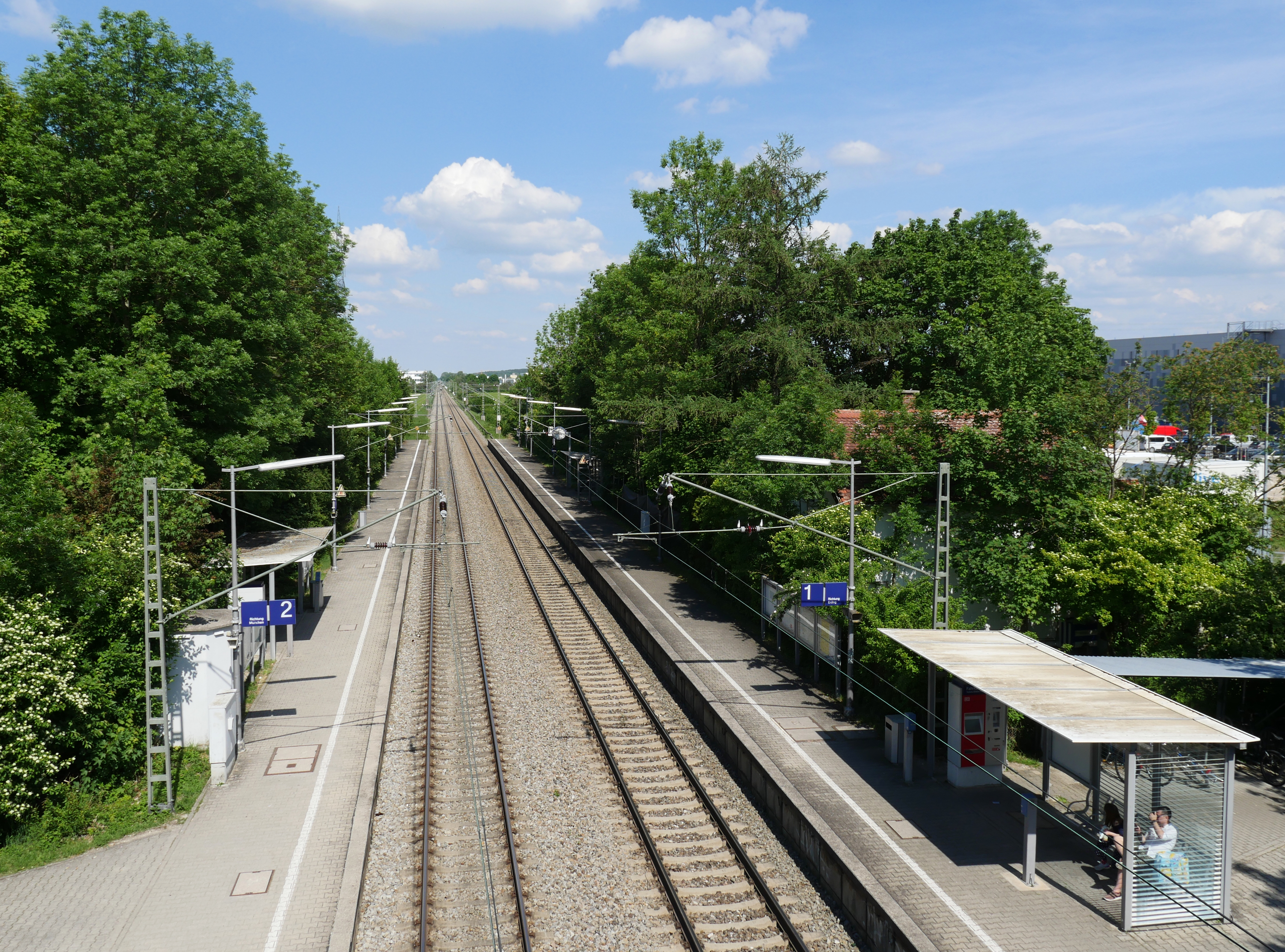 Seitenbahnsteige des S-Bahn-Haltepunkts Grub (Oberbay), rechts im Gebüsch ist das Wärterhaus des ehemaligen Schrankenpostens zu erkennen. Blick nach Osten von der Fußgängerbrücke.